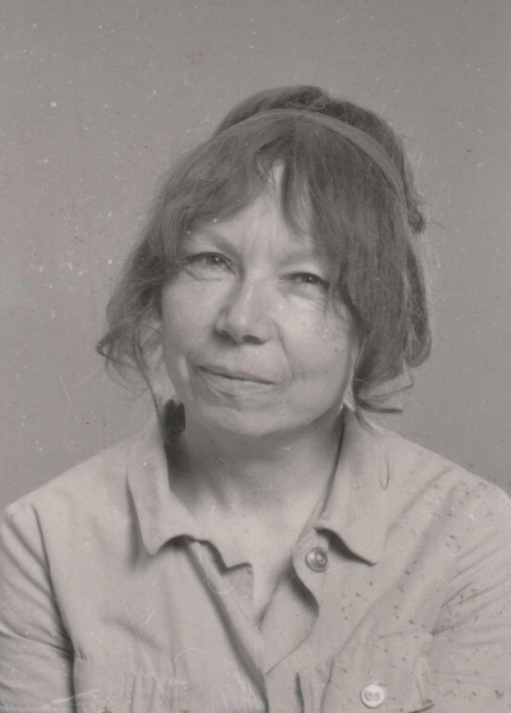 Ritratto di Carola Mazot